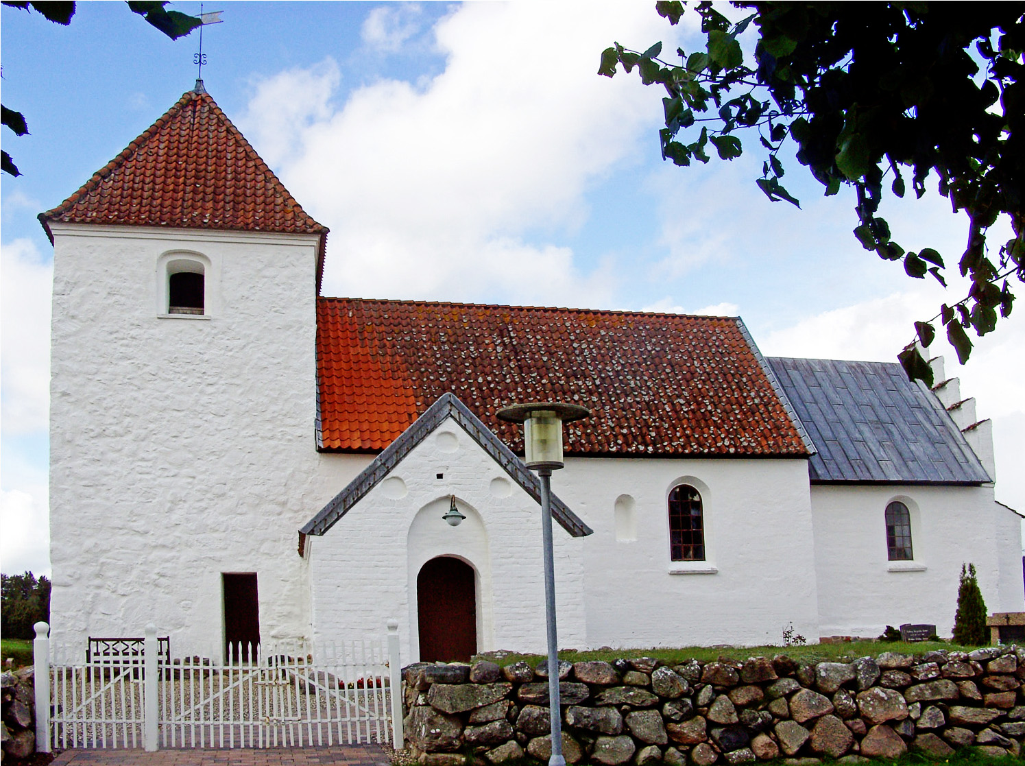 fra syd